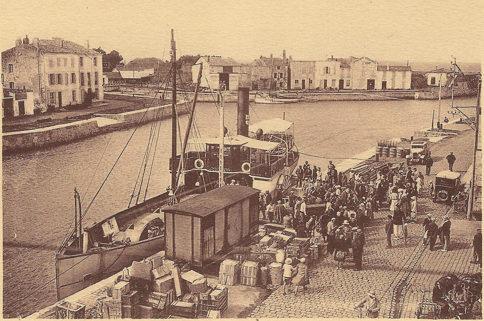 Île de Ré (Charentes, France)